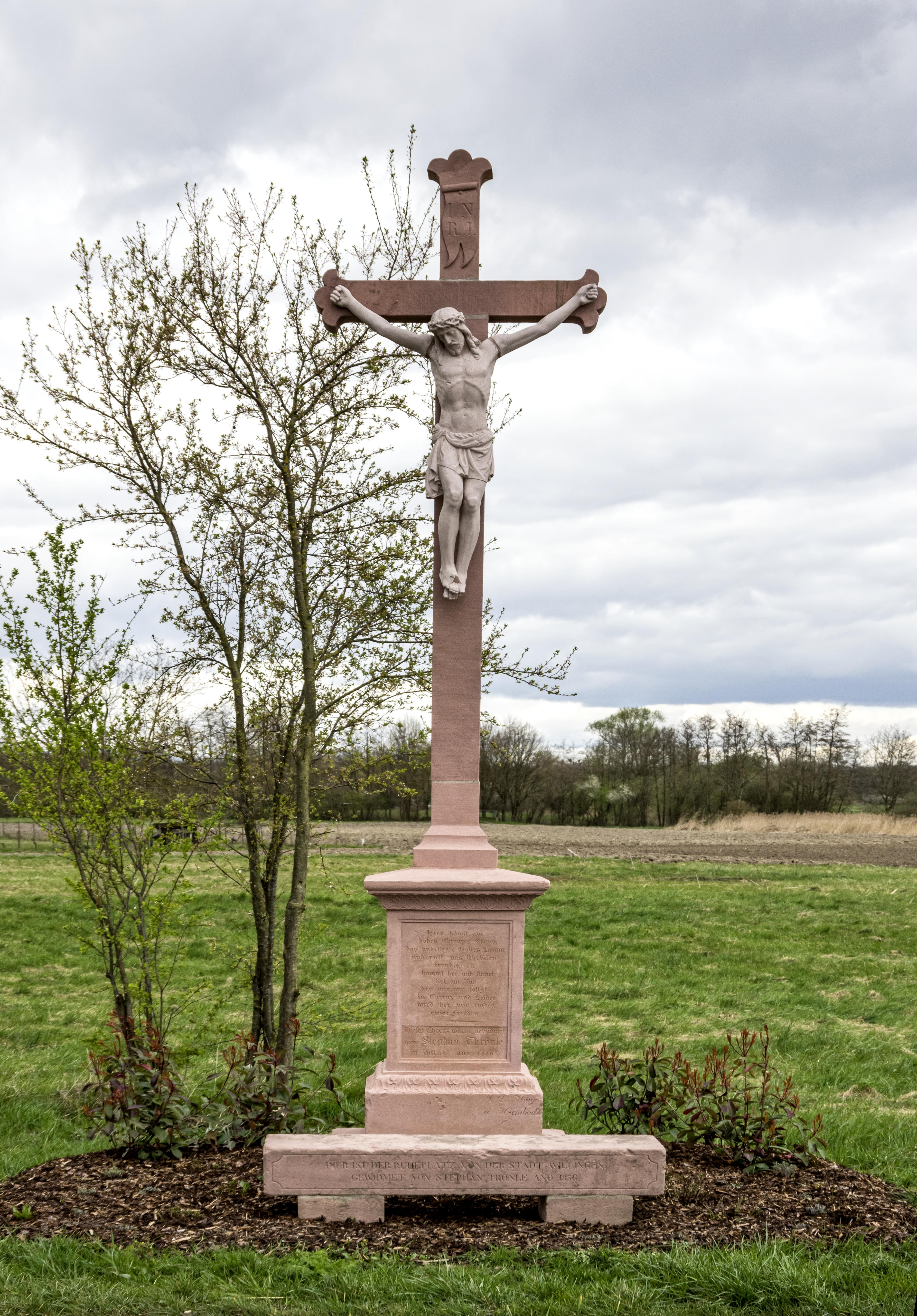 Bilder aus dem Landkreis Emmendingen Das Kreuz erinnert an das abgegangenes Dorf Wellingen oder Wöllingen in der Rheinebene etwa ein Kilometer nordöstlich von Wyhl am Kaiserstuhl